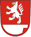 znak obce